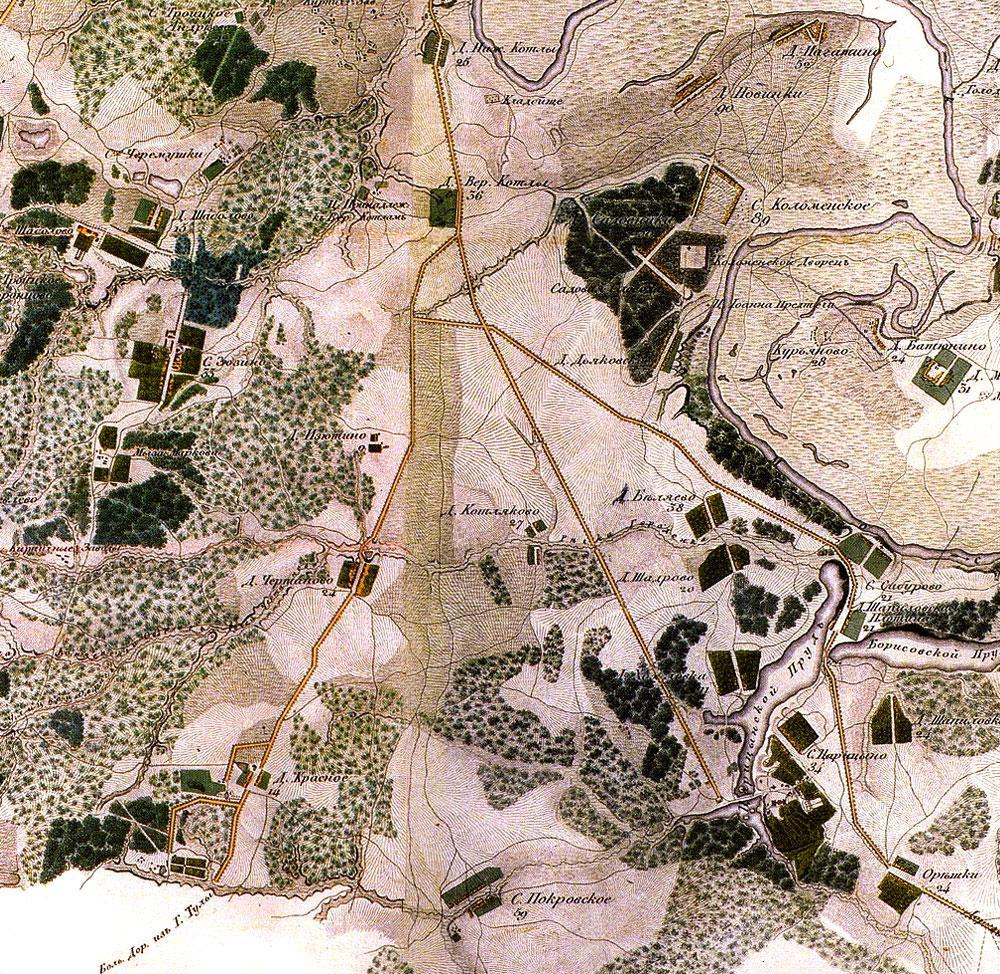 Топографическая карта окружности Москвы, 1818 год, фрагмент: территория современных Коломенского, Чертанова, Бирюлёва, Царицына